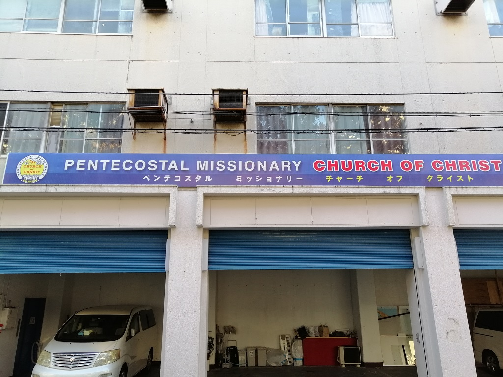 PENTECOSTAL MISSIONARY CHURCH OF CHRIST, Heiwa, Nagoya